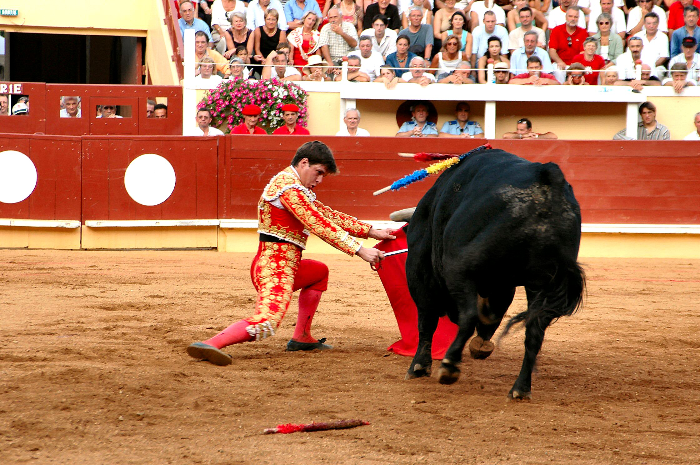 El Juli, Concentration, Bayonne 5 Septembre 2004